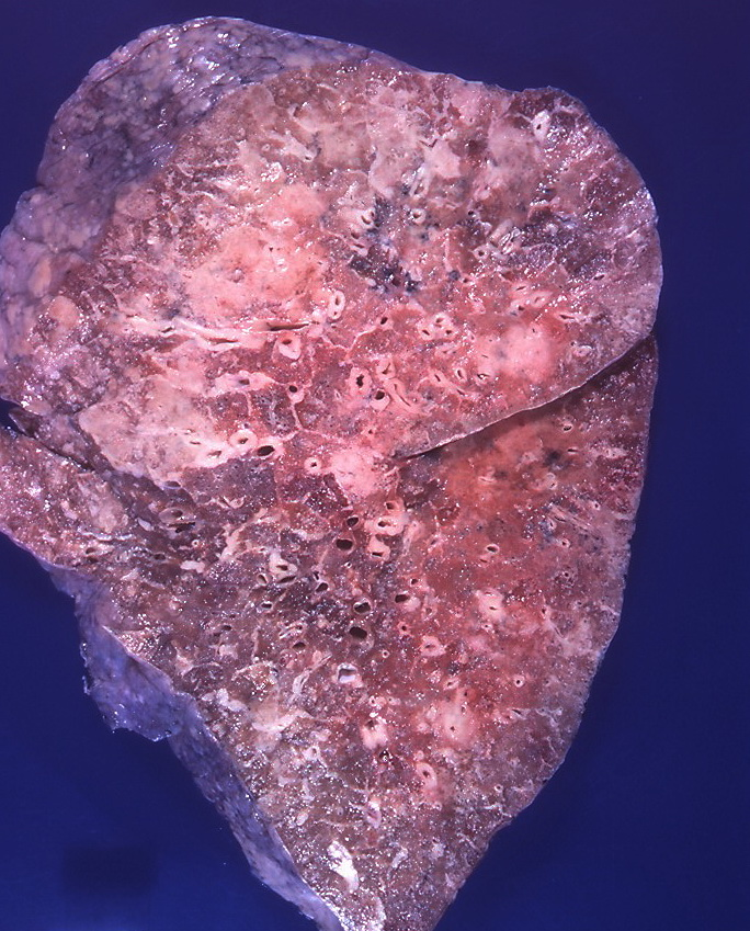 Metastatic prostatic adenocarcinoma